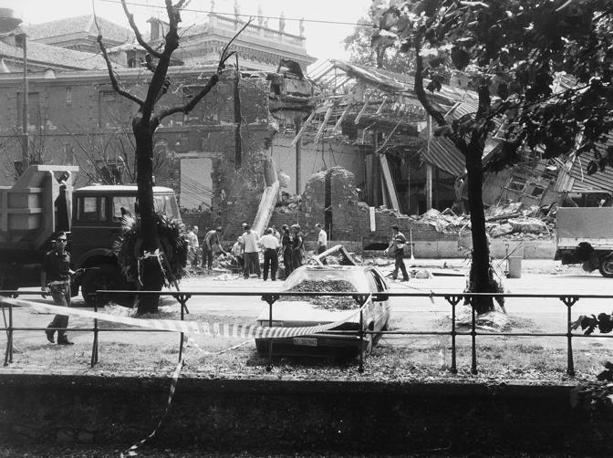 Strage di Via Palestro a Milano, 27 luglio 1993 (foto d'epoca)